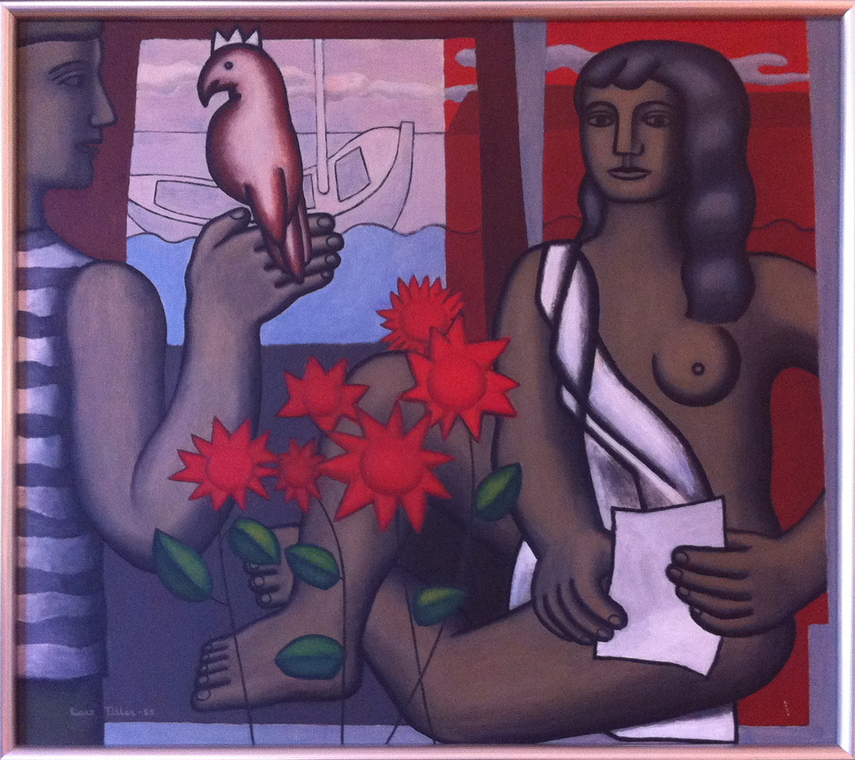 Maleriet "Invitasjon til reise" er inspirert av C. Baudelaires dikt "Invitation au voyage". Tiller malte ihvertfall tre malerier med denne tittelen.